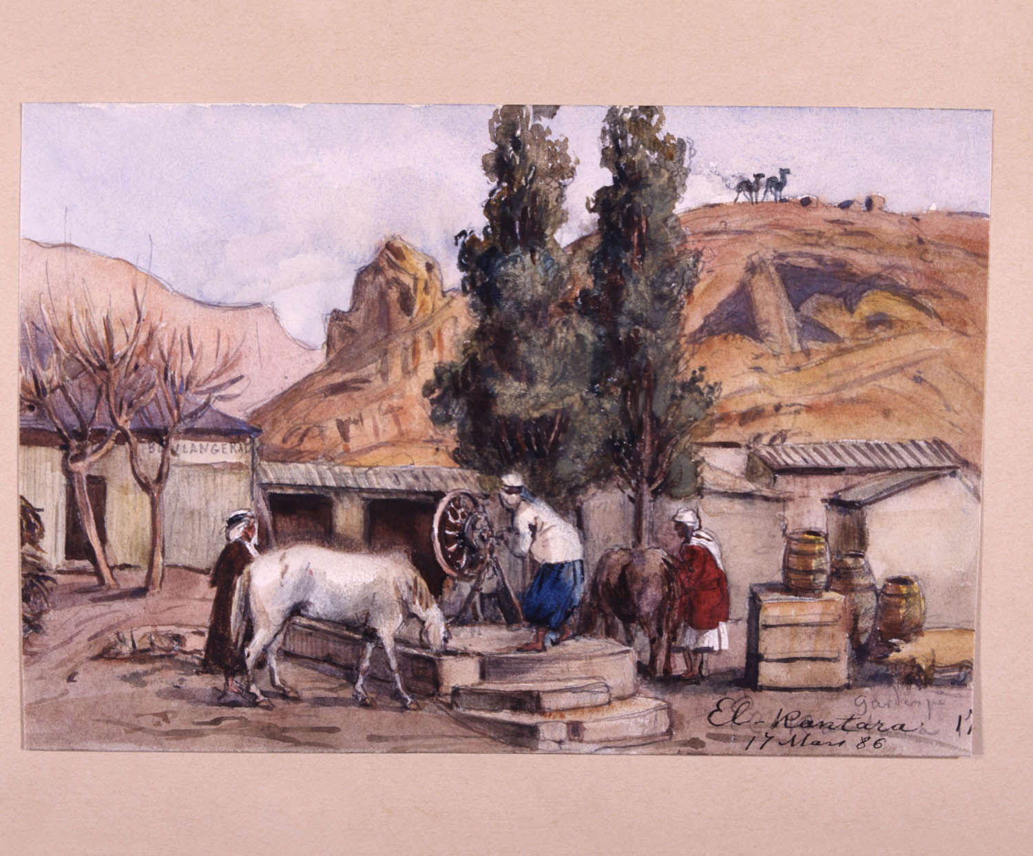 depicted place: El Kantara (Algeriet (DZ))